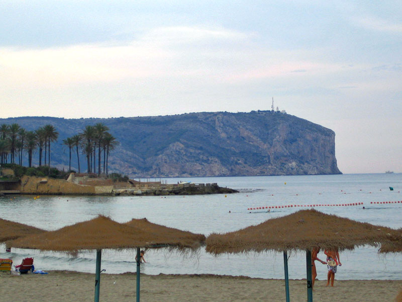 Cap i plana de Sant Antoni des de la platja de les arenetes, Xàbia, Marina Alta, País Valencià.